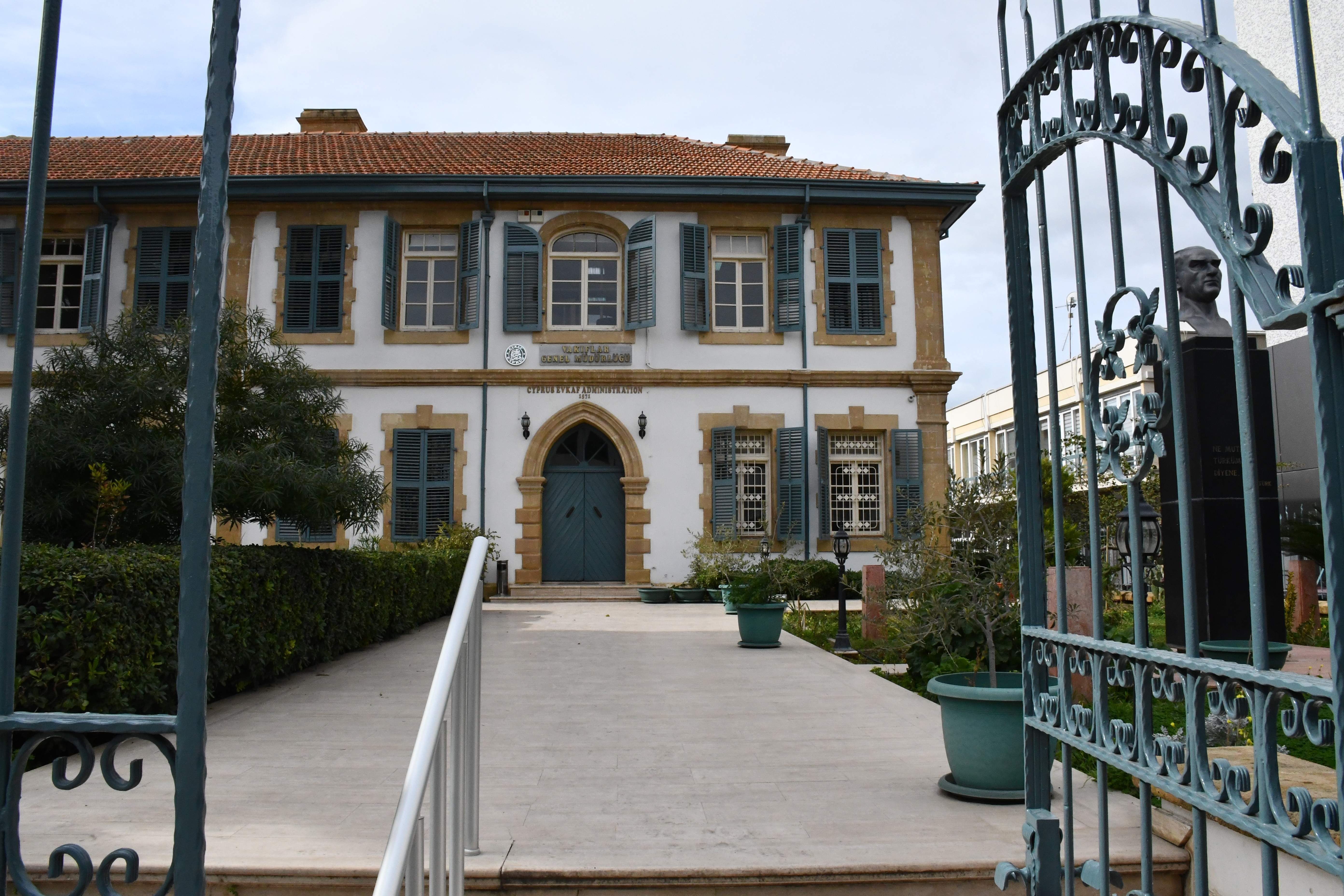 Vakıflar İdaresi Binası önce cepheden görünüşü